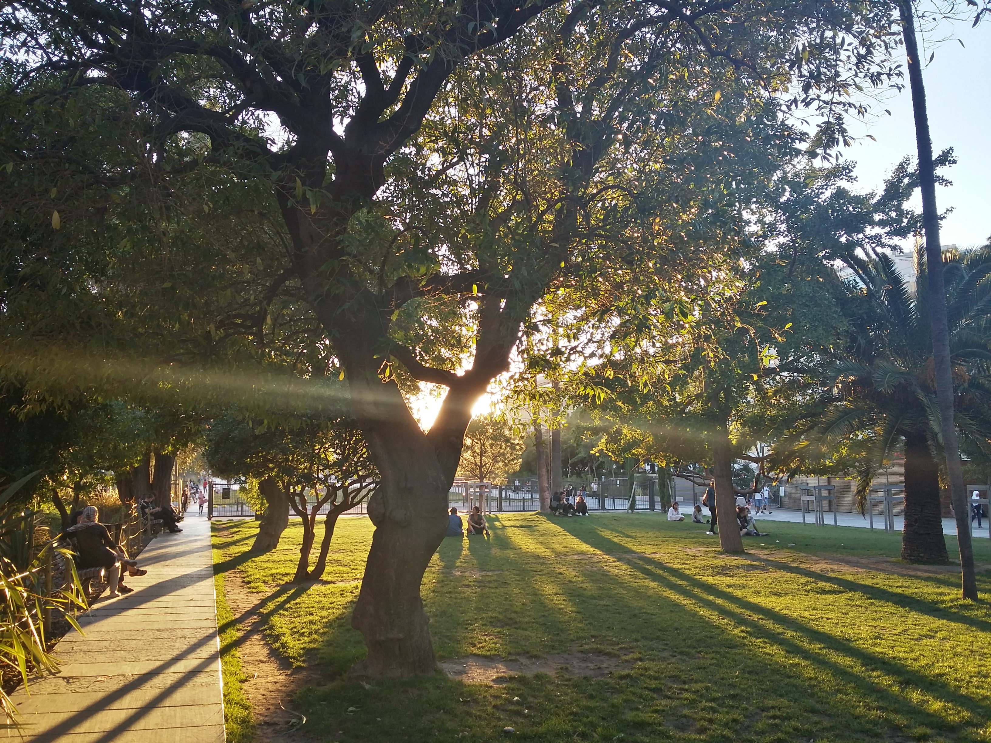 Coulée Verte à Nice